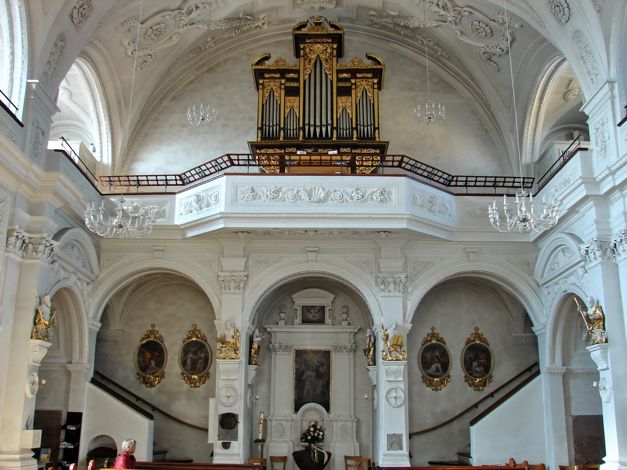 Katholische Stadtpfarrkirche Mariä Himmelfahrt in Pfreimd